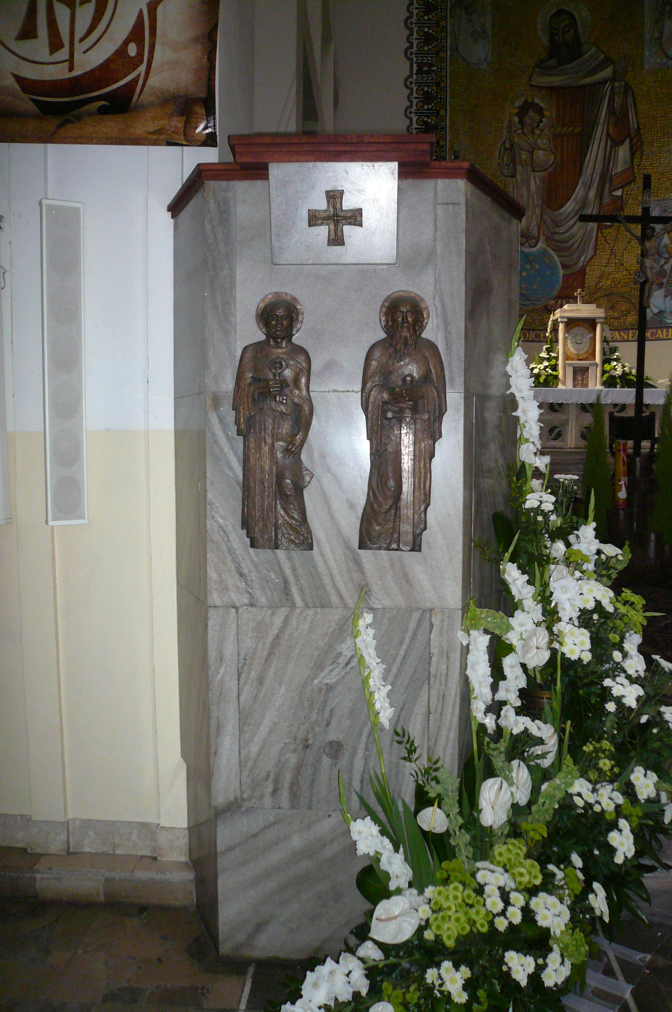 Ambona kościoła górnego św. Józefa Oblubieńca Najświętszej Maryi Panny na Kole w Warszawie. Płaskorzeźby z brązu przedstawiają śś. Piotra i Pawła